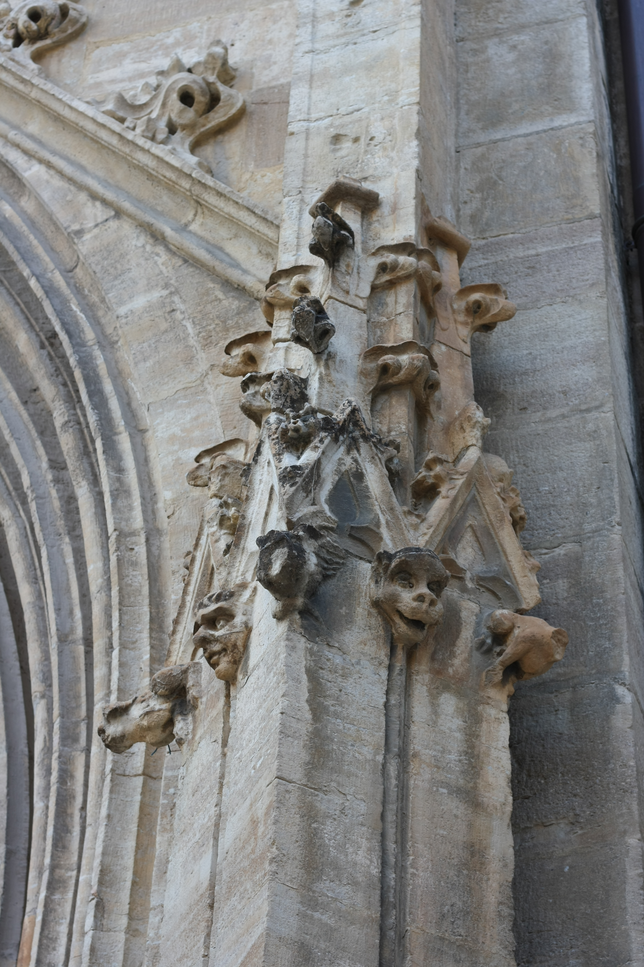 Kathedrale von Mende, Detail der Fassade